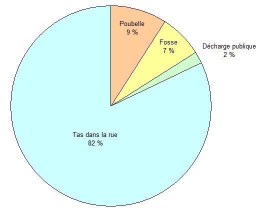 Modes d'évacuation des ordures à Tougan (Burkina Faso)